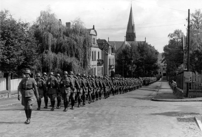 Eine Polizeibtl. marschiert in Forbach ein.